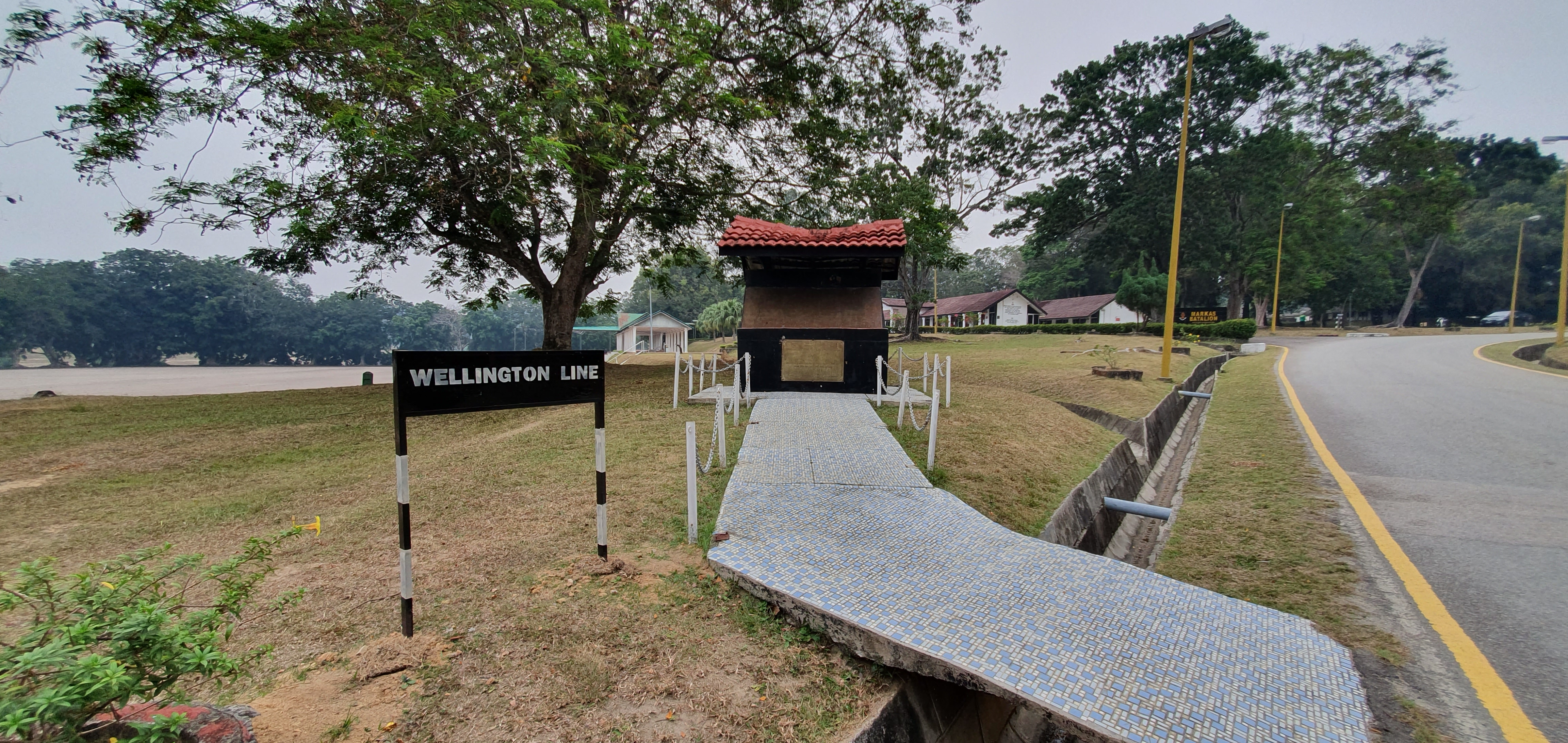 Main road